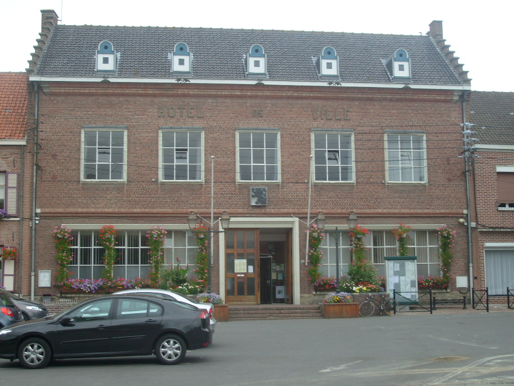 Mairie de Wormhout